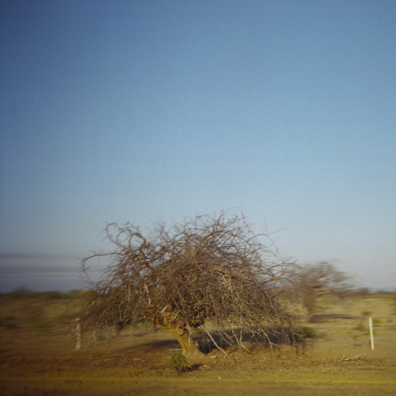 Picture from the brazilian hinterland (Foto do sertão do nordeste brasileiro)